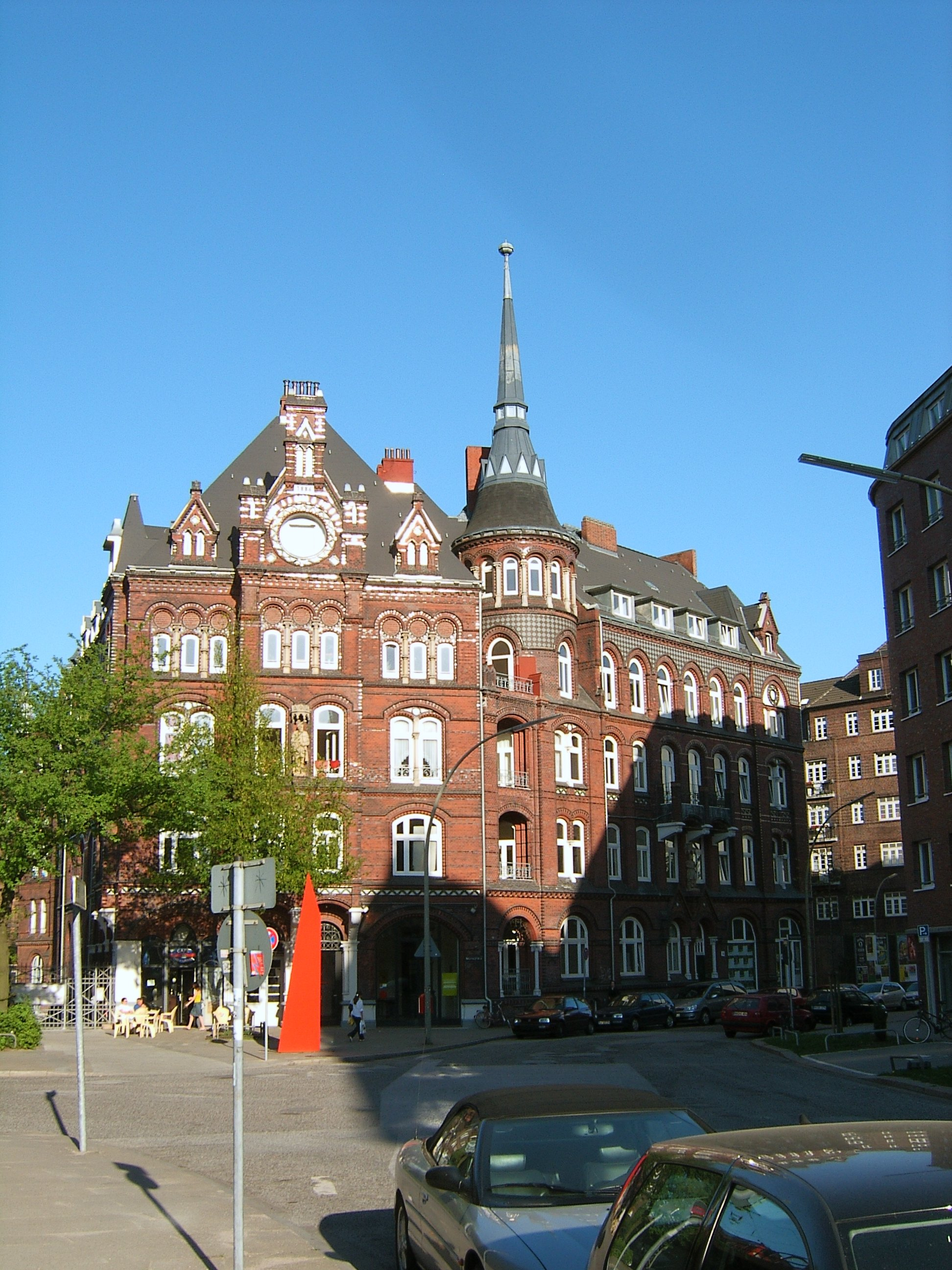 Die Münzburg am Münzplatz 11 in Klostertor wurde 1880 bis 1886 nach Plänen von Johann Heinrich Martin Brekelbaum erbaut. Der Backsteinrohbau ist nach Vorbildern der Hannoverschen Schule errichtet worden.